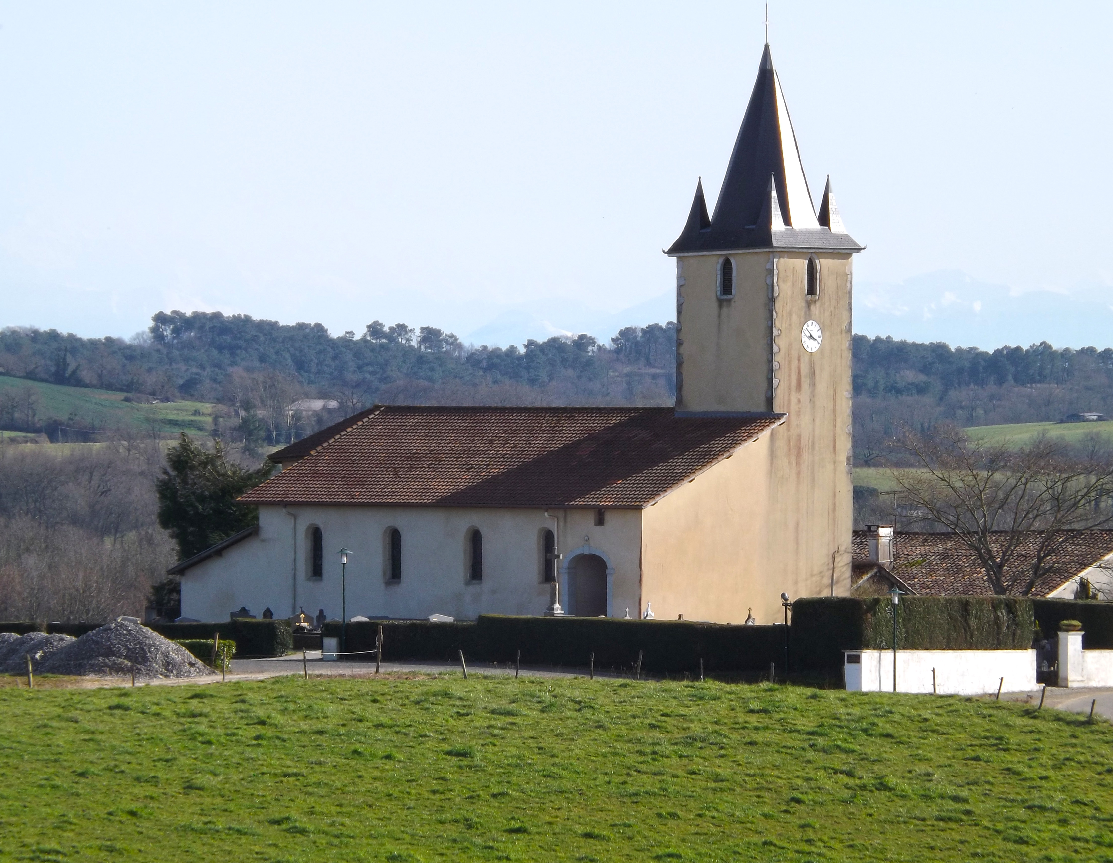 Glèisa de Moscardés, Shalòssa, Gasconha